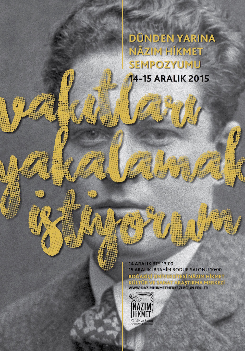 Sempozyum Posteri